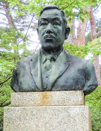 創立者 溝口梅太郎先生